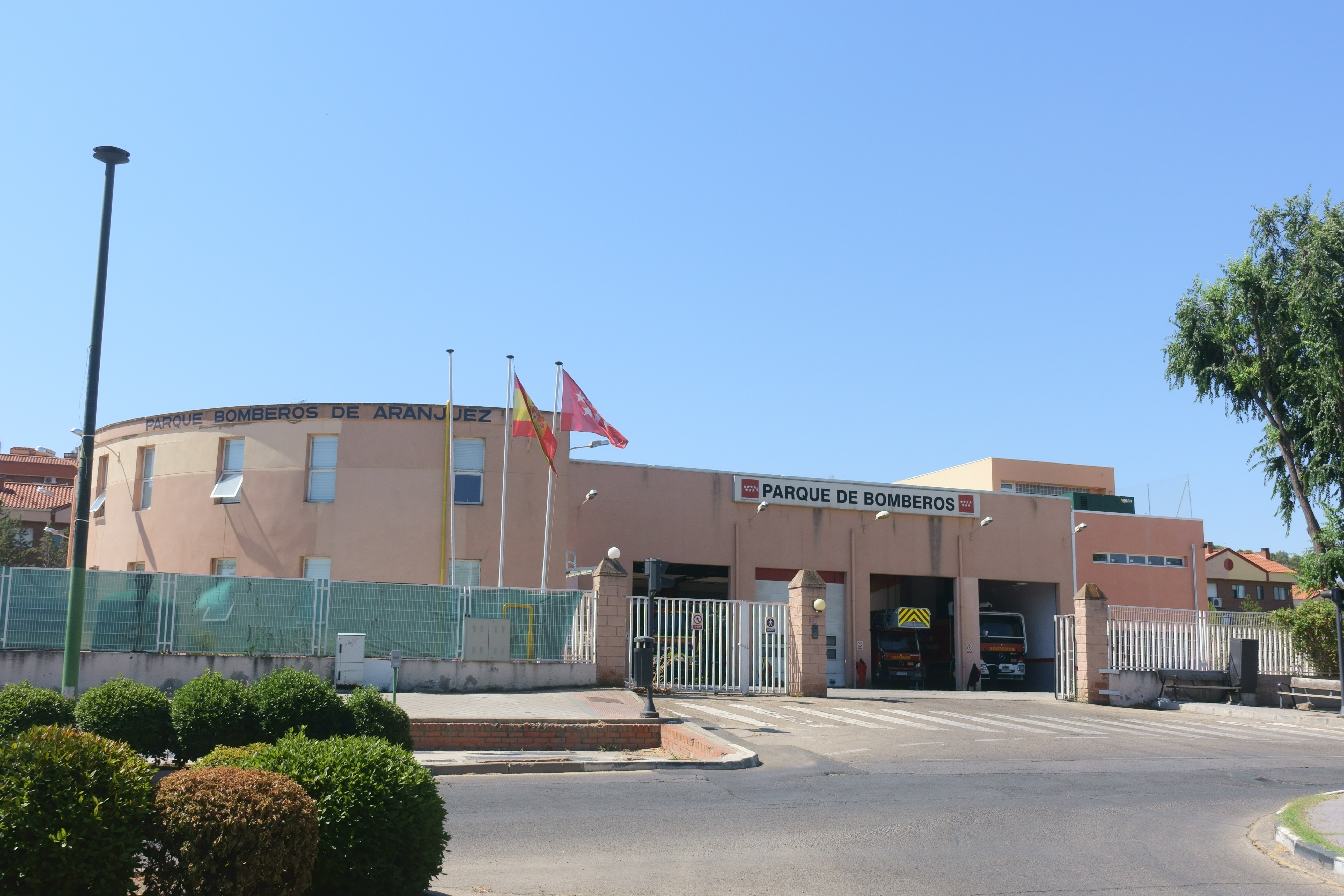 Parque de bomberos de Aranjuez (Madrid, España).